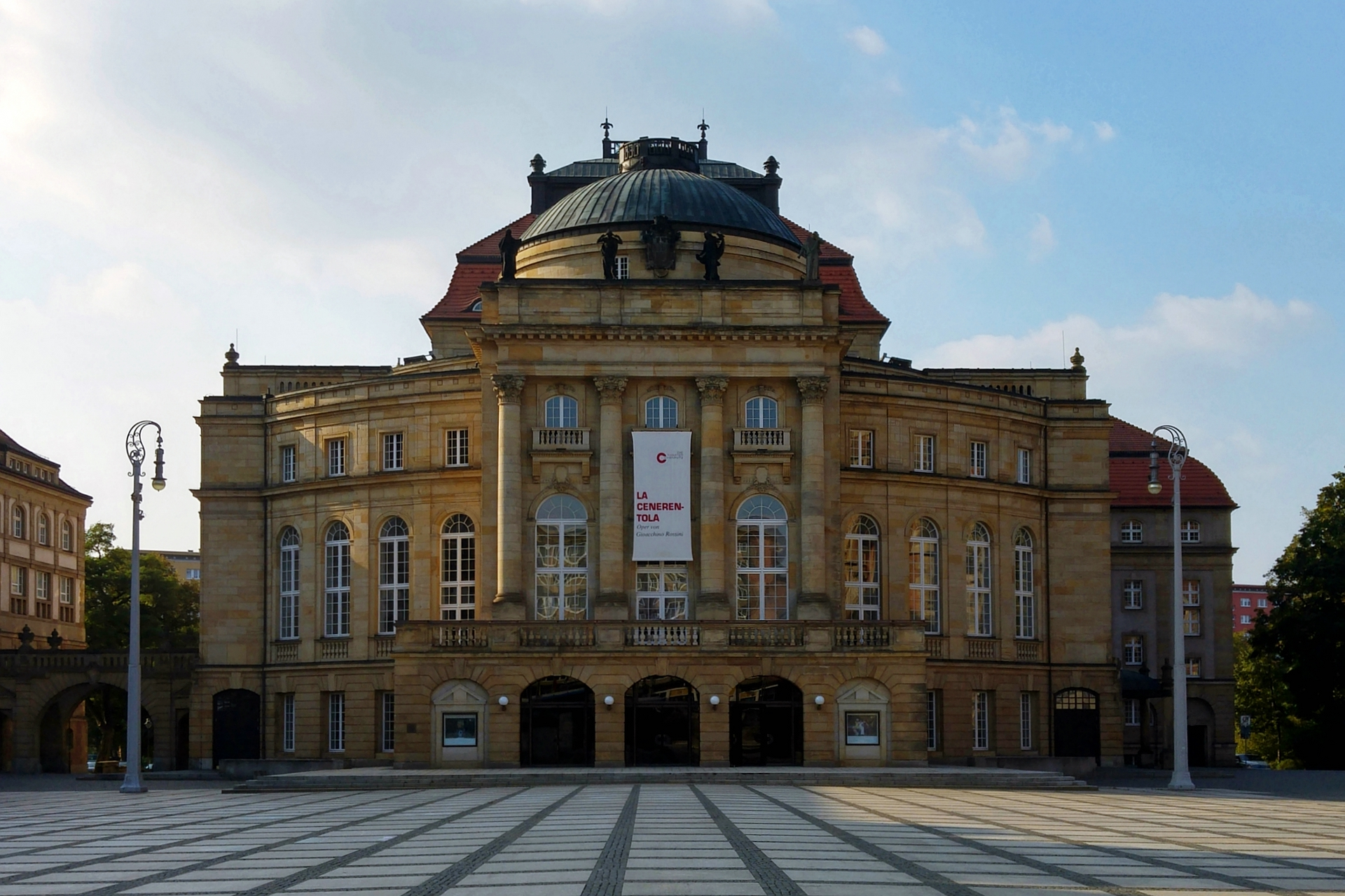 Das Opernhaus Chemnitz 2016